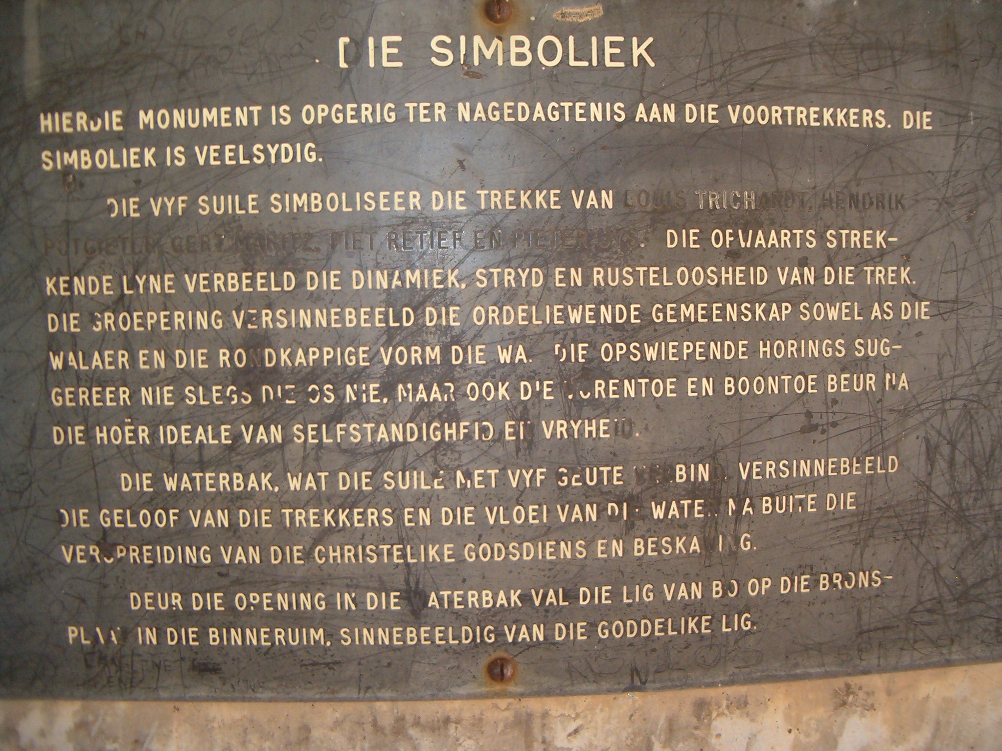 Winburgmonument simboliek